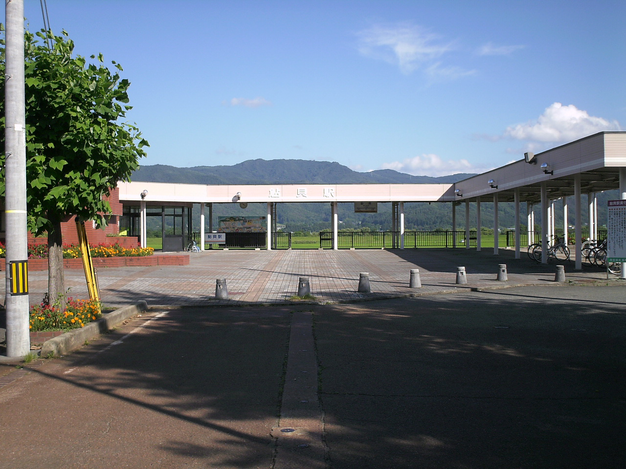 Ayukai Station.